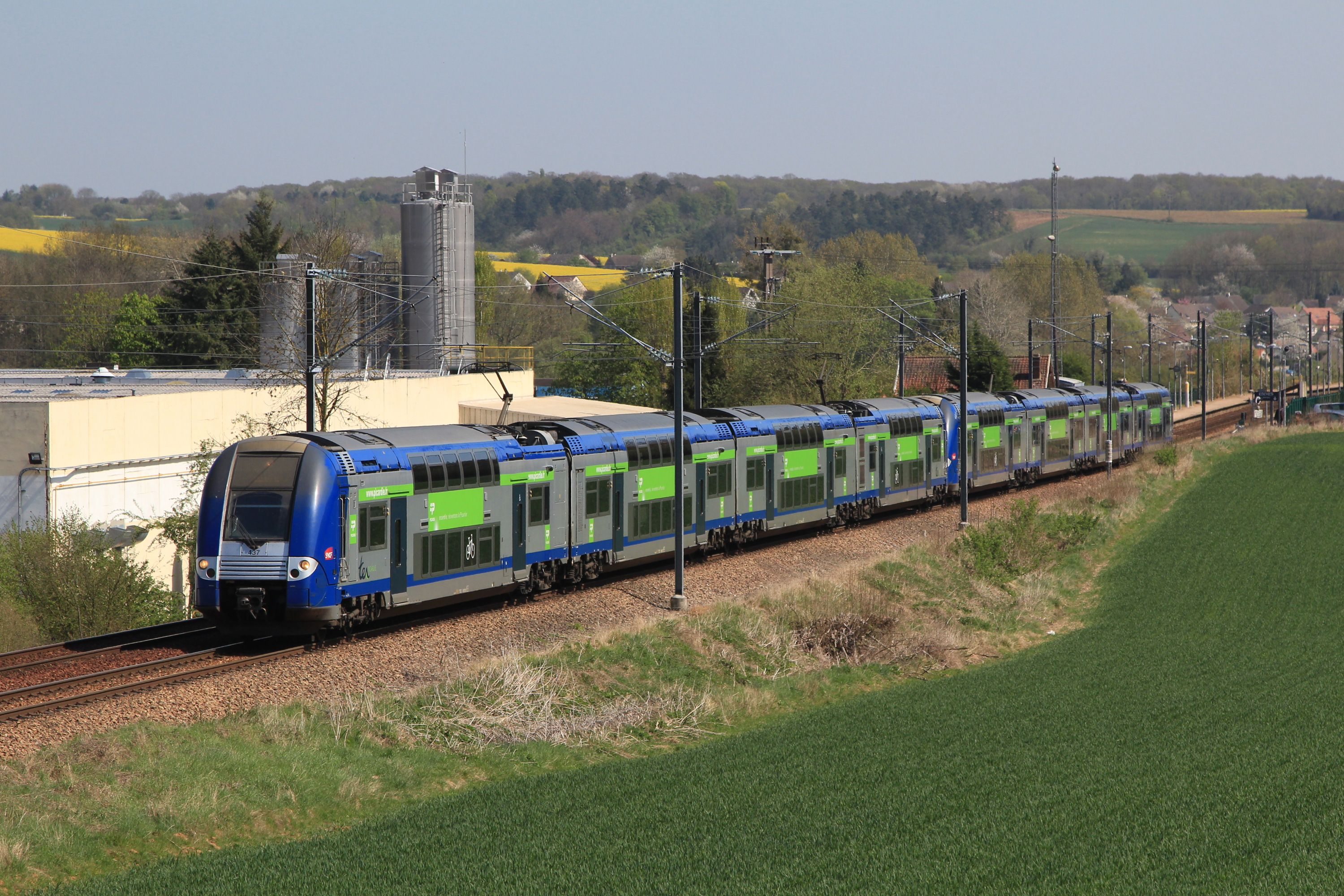 Une UM de TER 2N NG au TER 47421 (Paris-Nord - Beauvais) repart de la gare d'Esches.